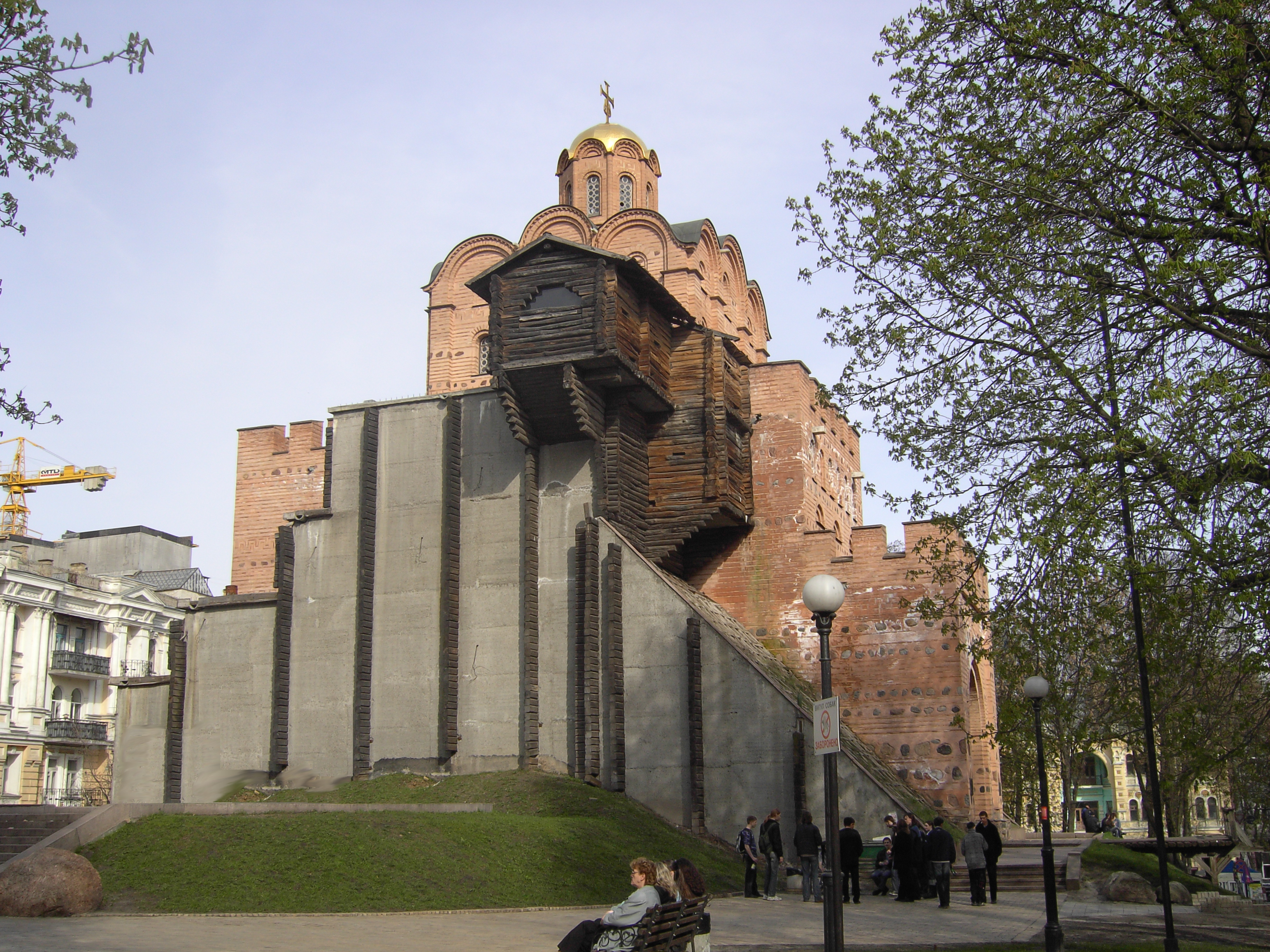 Golden Gate (Kiev) / Золоті ворота (Київ)